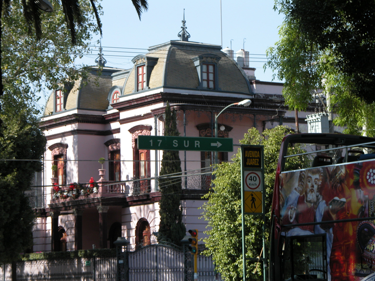 " La Casa de los Enanitos"An old house in Ave. Juárez, Puebla, Mexico